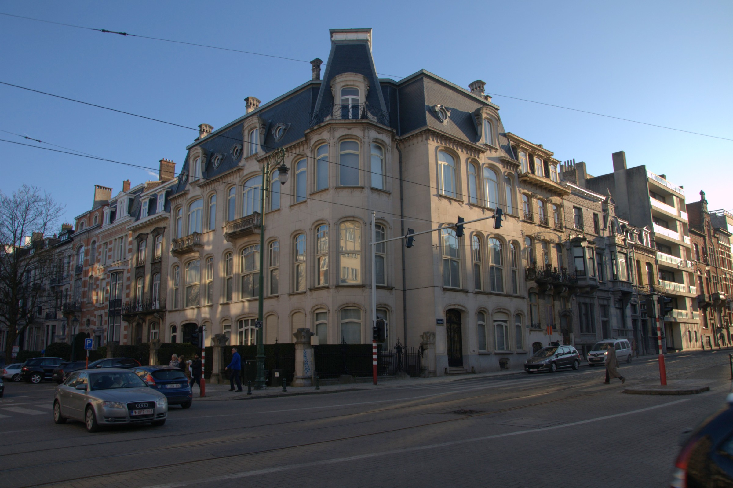 patrimoine immobilier de bruxelles